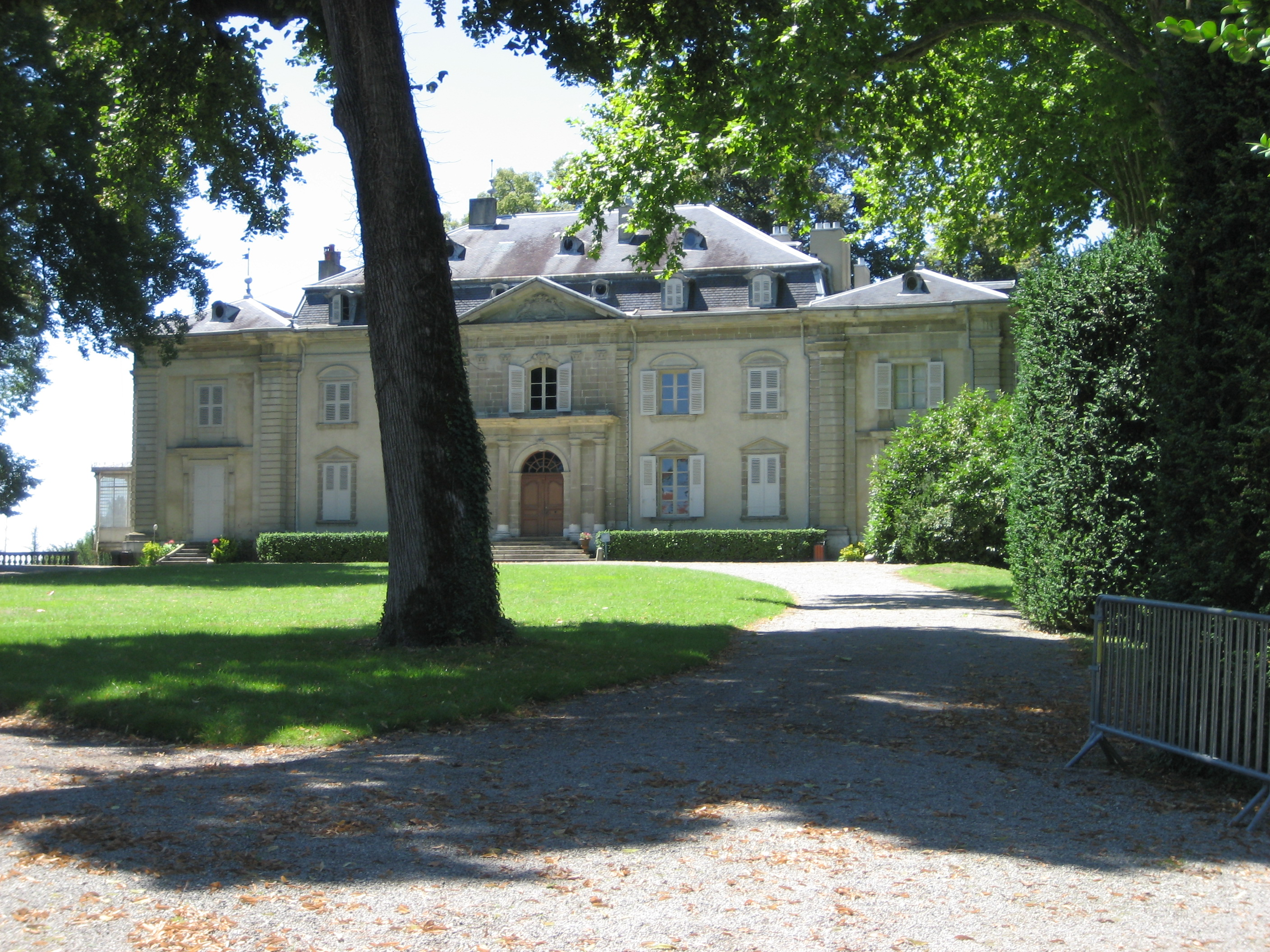 Voltaire's chateau at Ferney-Voltaire, France.